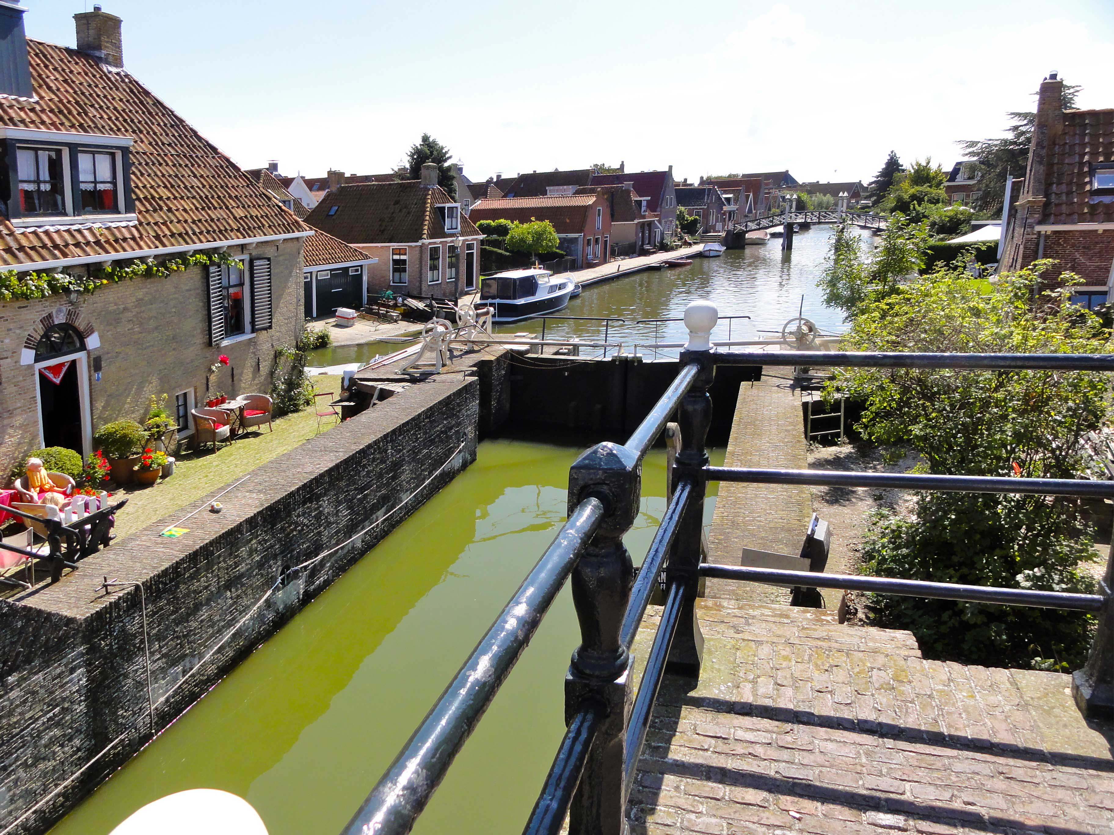 Sluis te Hindeloopen